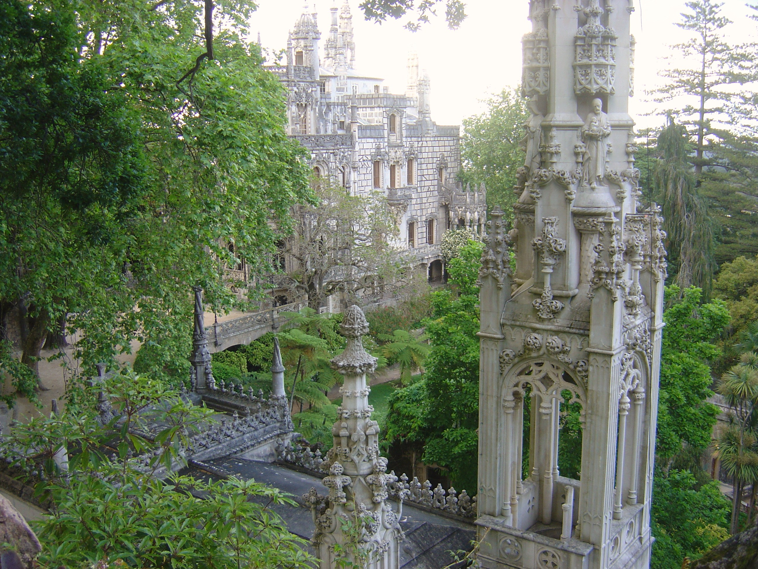 Quinta da Regaleira, Sintra, Portugal